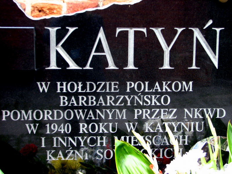 Gniezno. Teren kościoła farnego. Tablica poświęcona ofiarom zbrodni sowieckich.